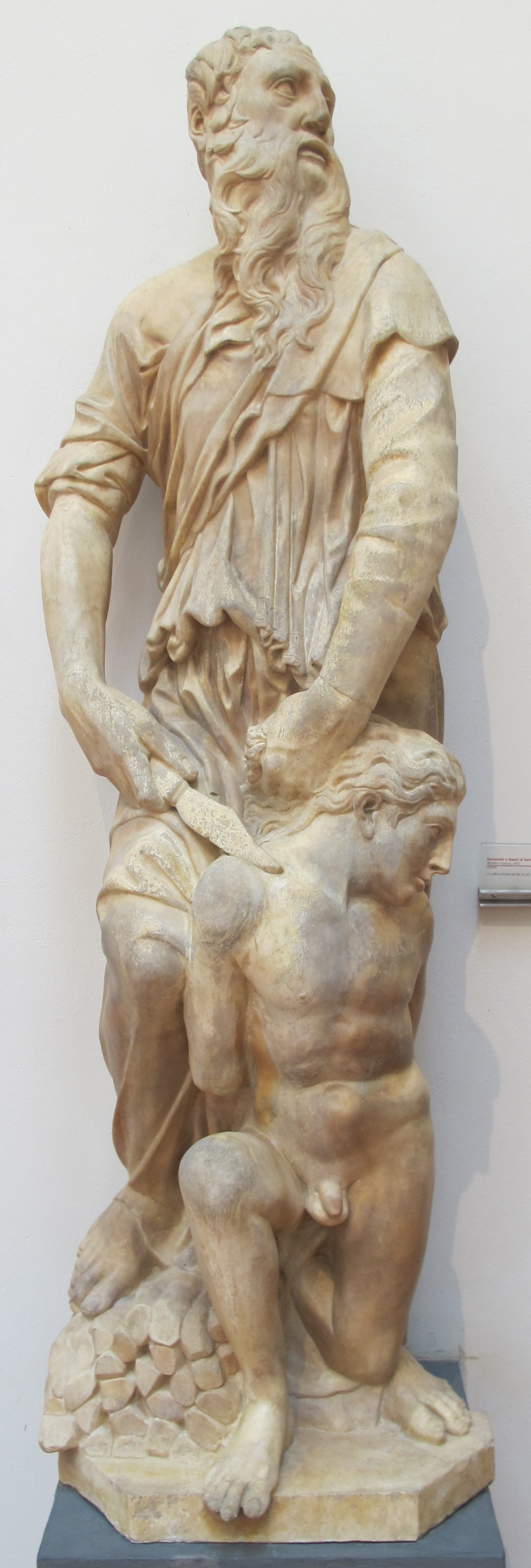 Donatello, sacrificio di isacco, 1421